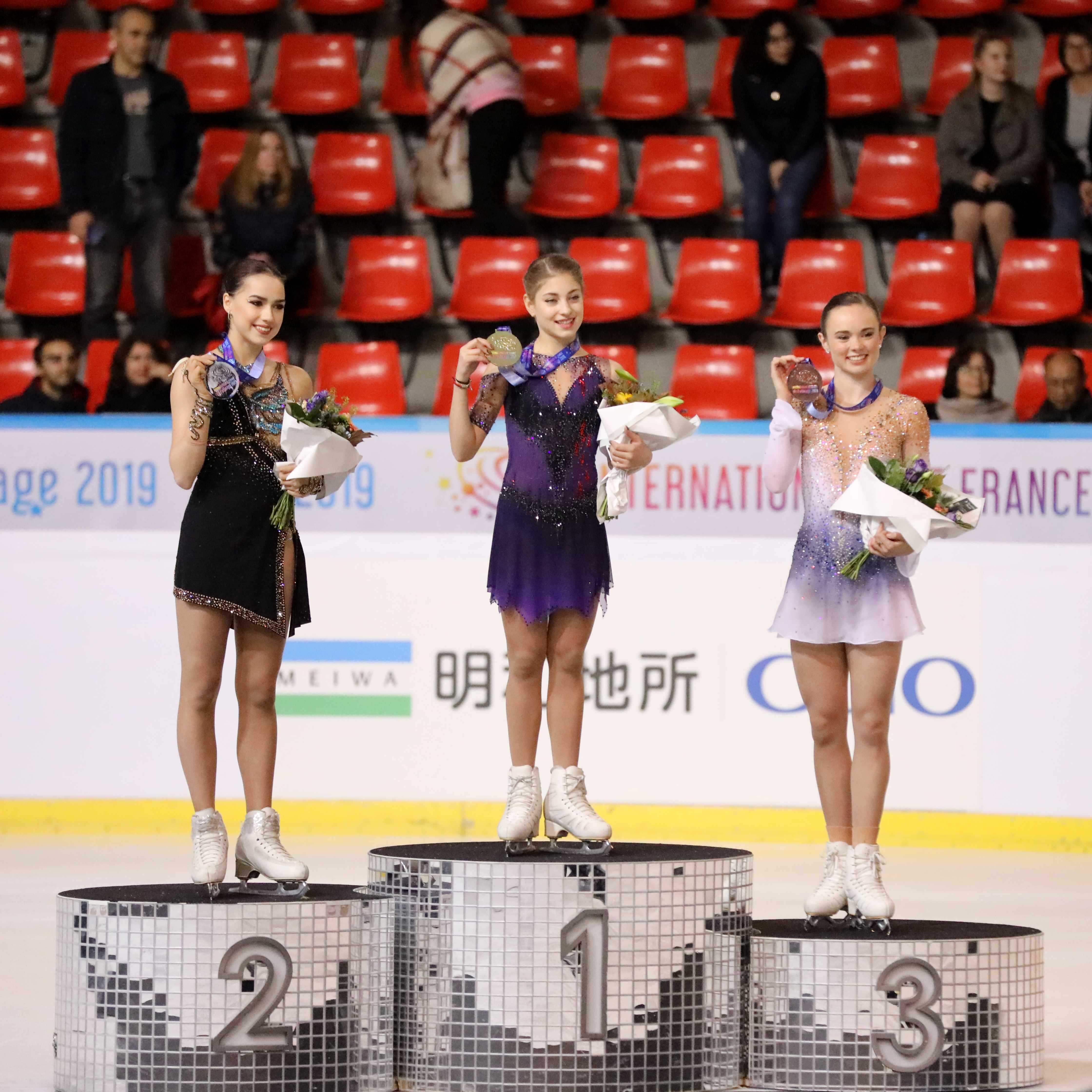 Internationaux de France 2019